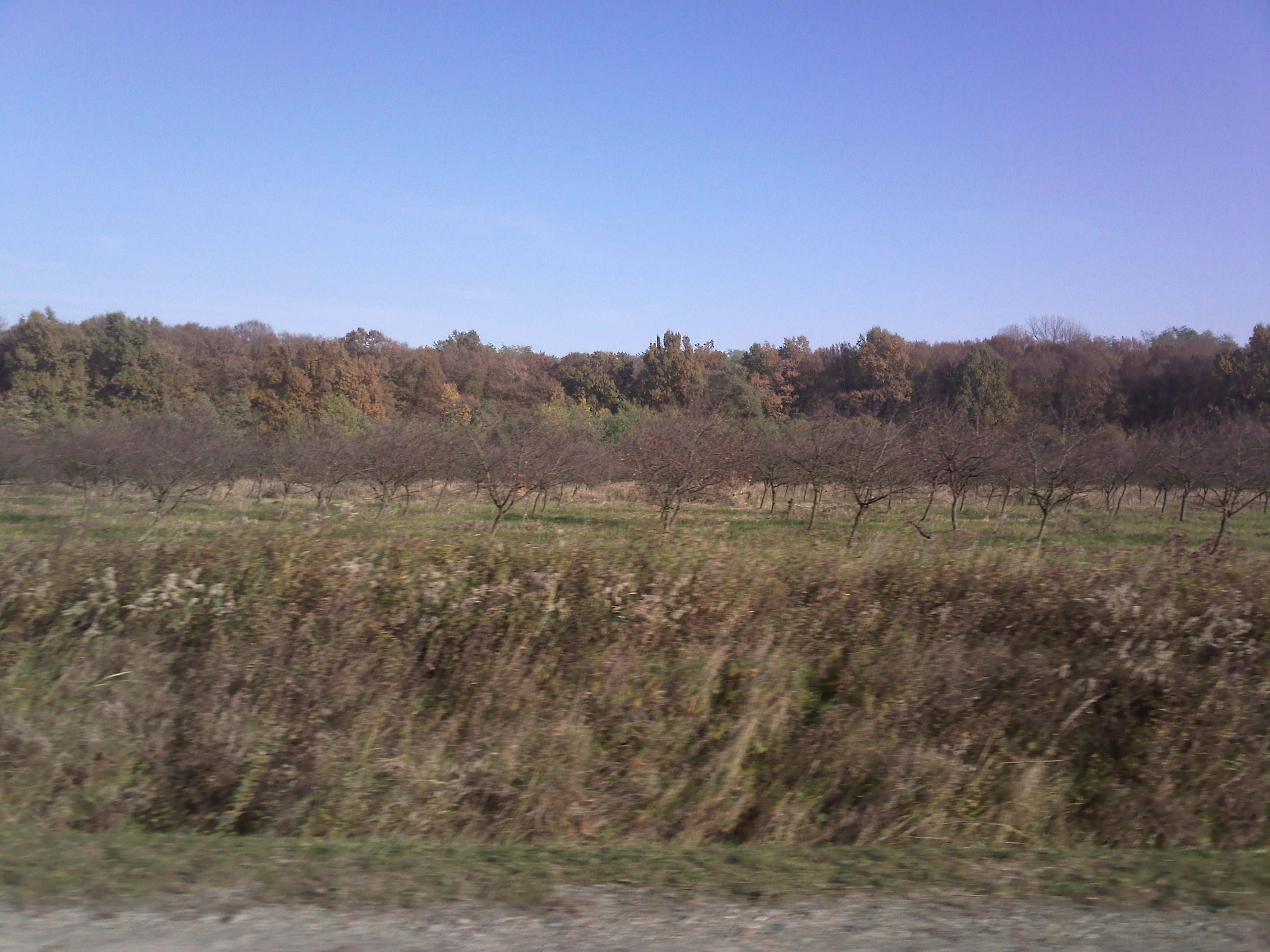 Bijeljevina Orahovička, Croatia